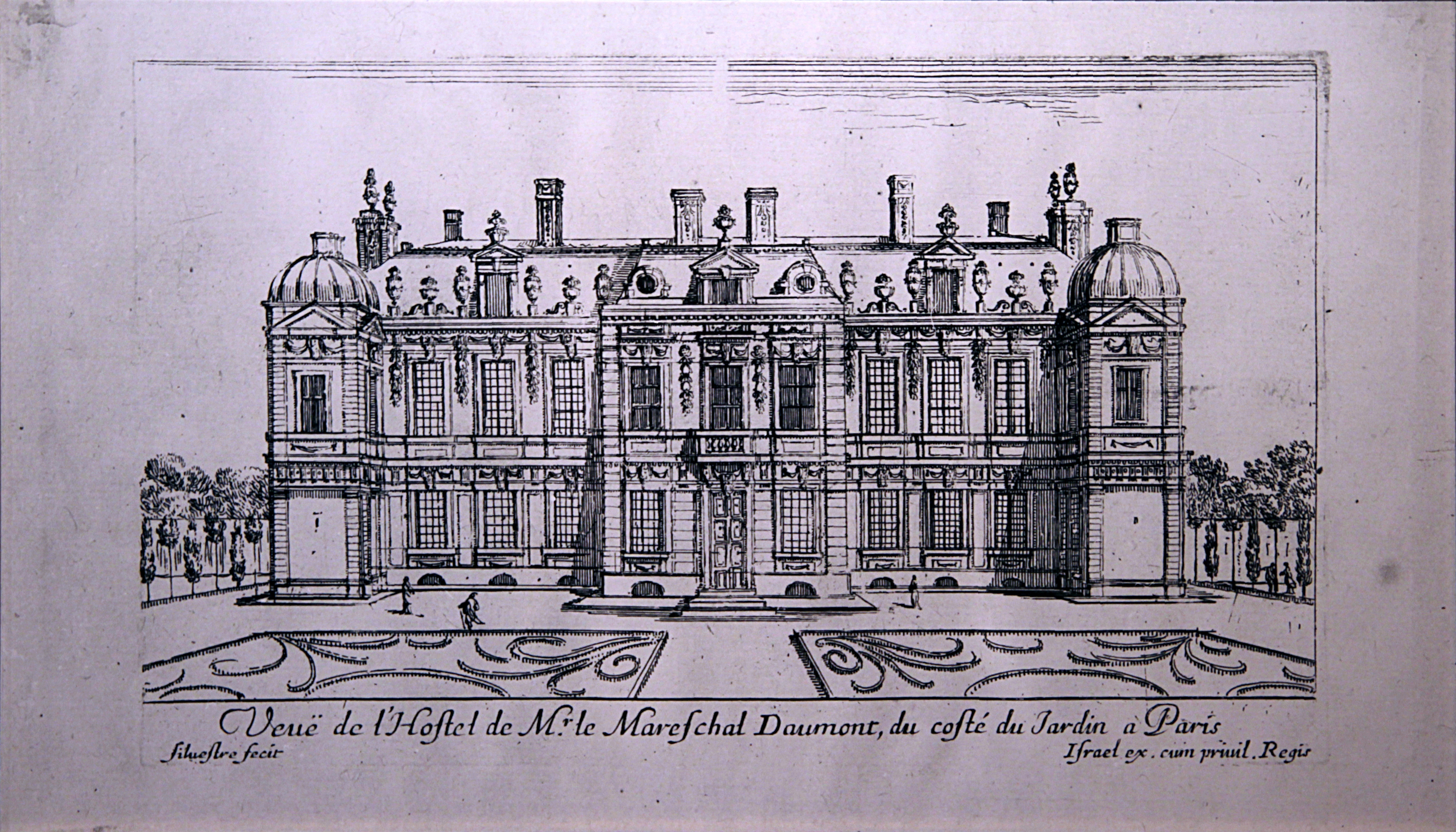 Gravure réalisée en 1652 par Israël Silvestre (L : 168 H : 109 ) représentant "l'Hostel de Mr. le Mareschal Daumont, du costé du Jardin a Paris", appartenant aux collections du château de Vaux-le-Vicomte - Maincy (Seine-et-Marne, France).